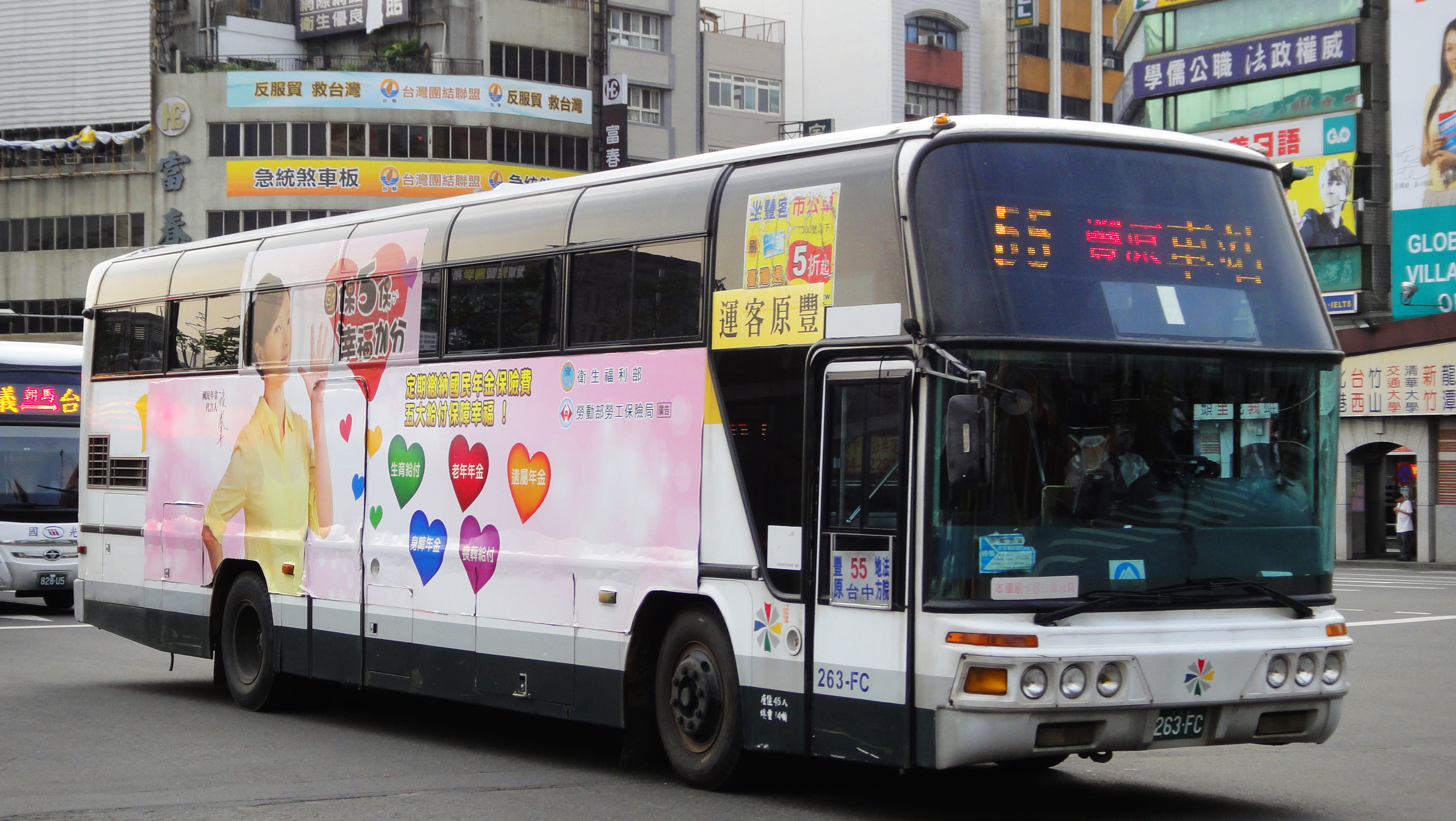 豐原客運日野ERK2JRL大客車263-FC行駛台中市公車55路